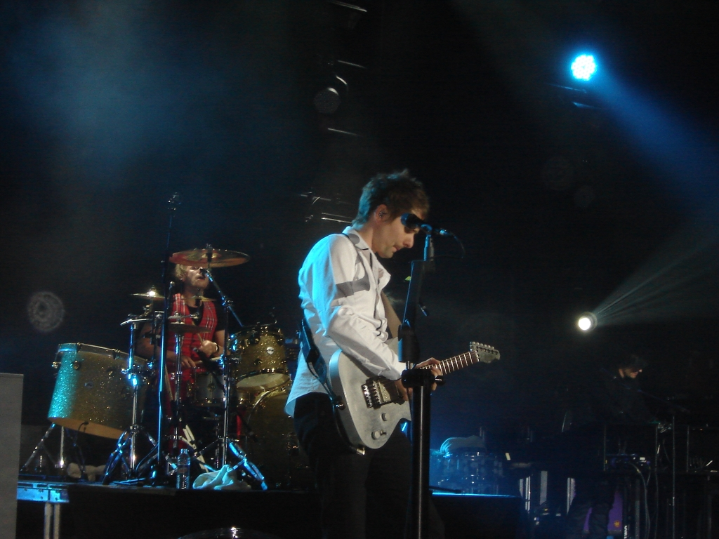 фото Мэттью Беллами 2009 год